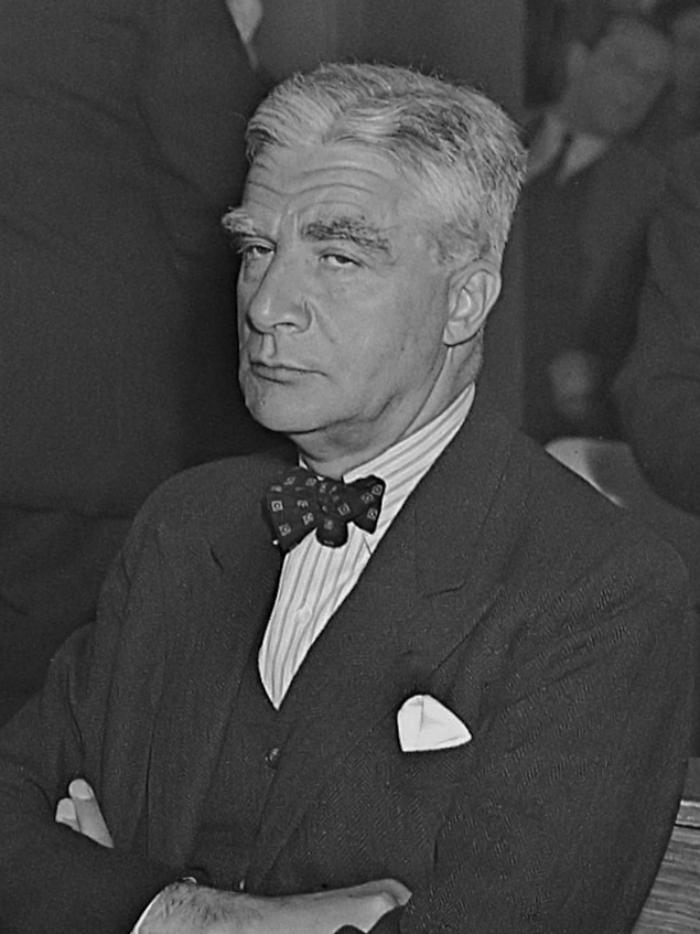 Burgemeester Voute voor Gerechtshof 25 april 1947